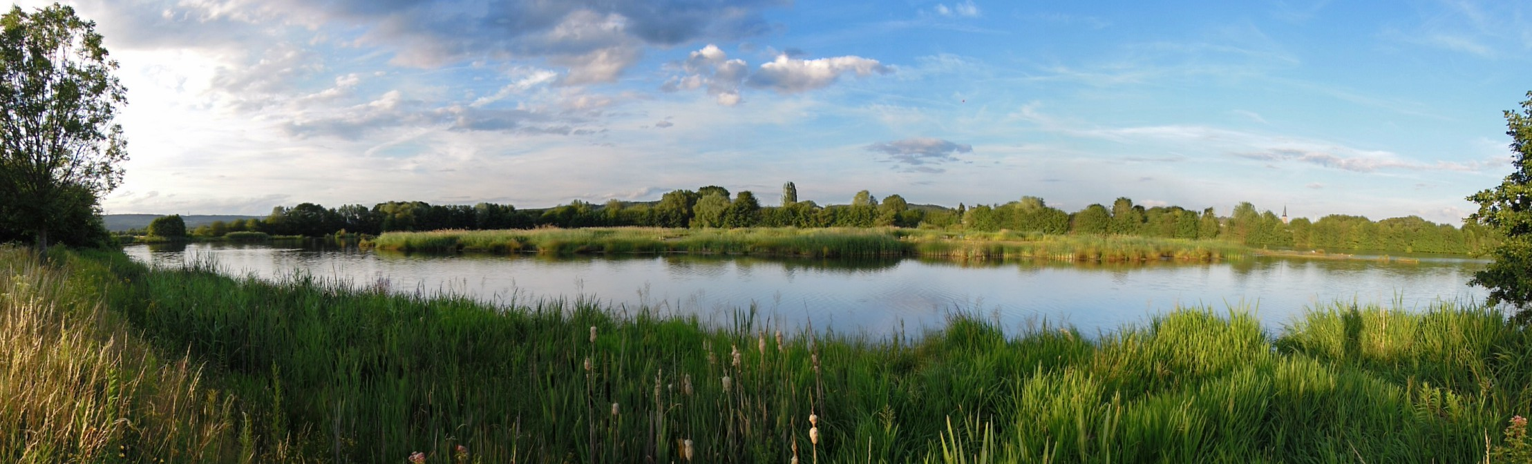 Blick über den Ökosee (Ausgleichsmaßnahme zur Saarkanalisierung) in Richtung Pachten